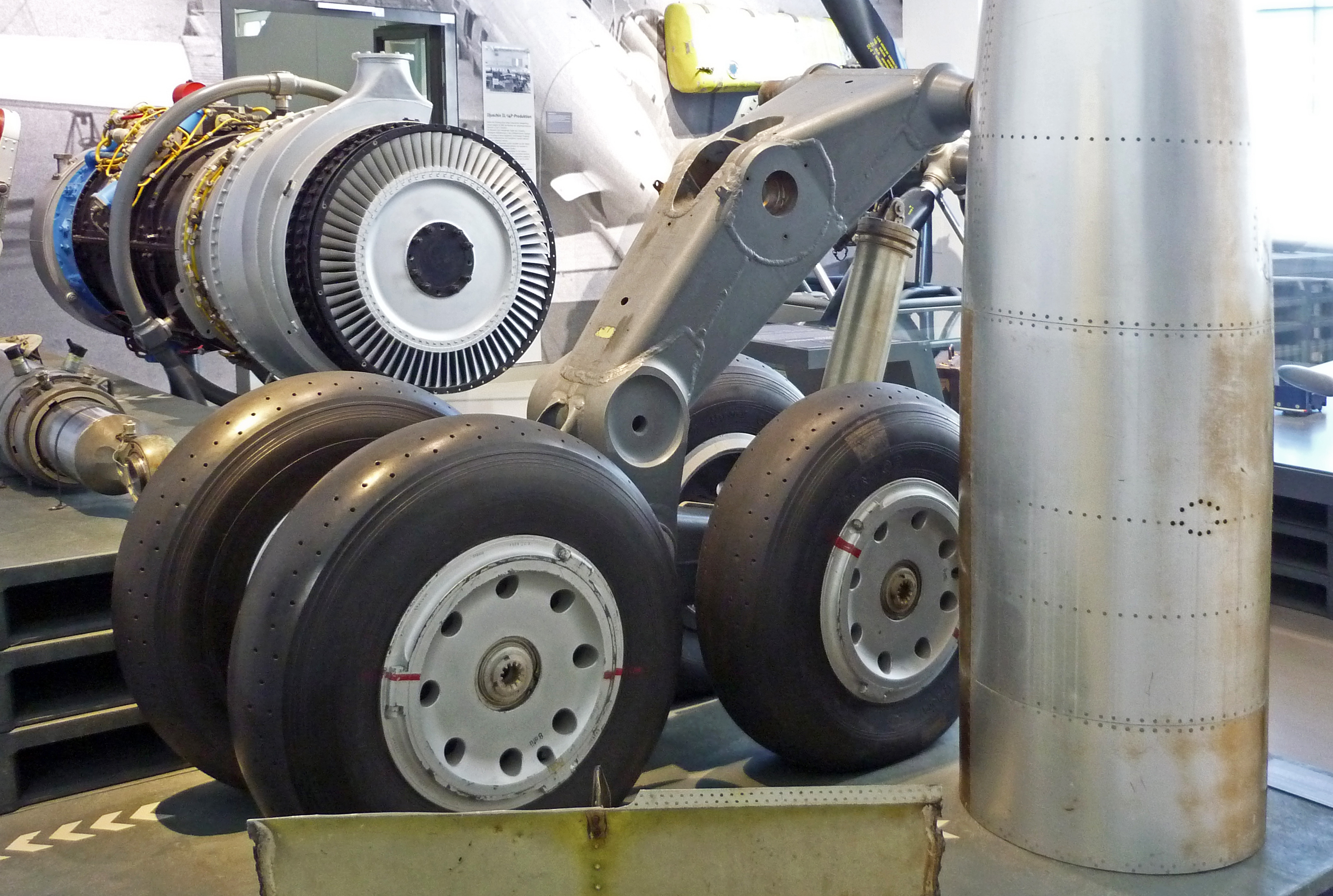 Verkehrsmuseum Dresden, Fahrwerk des Passagierflugzeugs 152